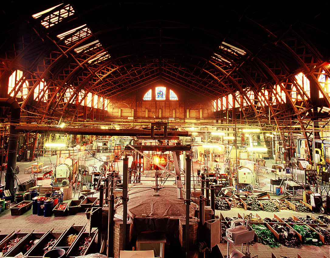 GlasLamberts Produktionshalle Waldsassen